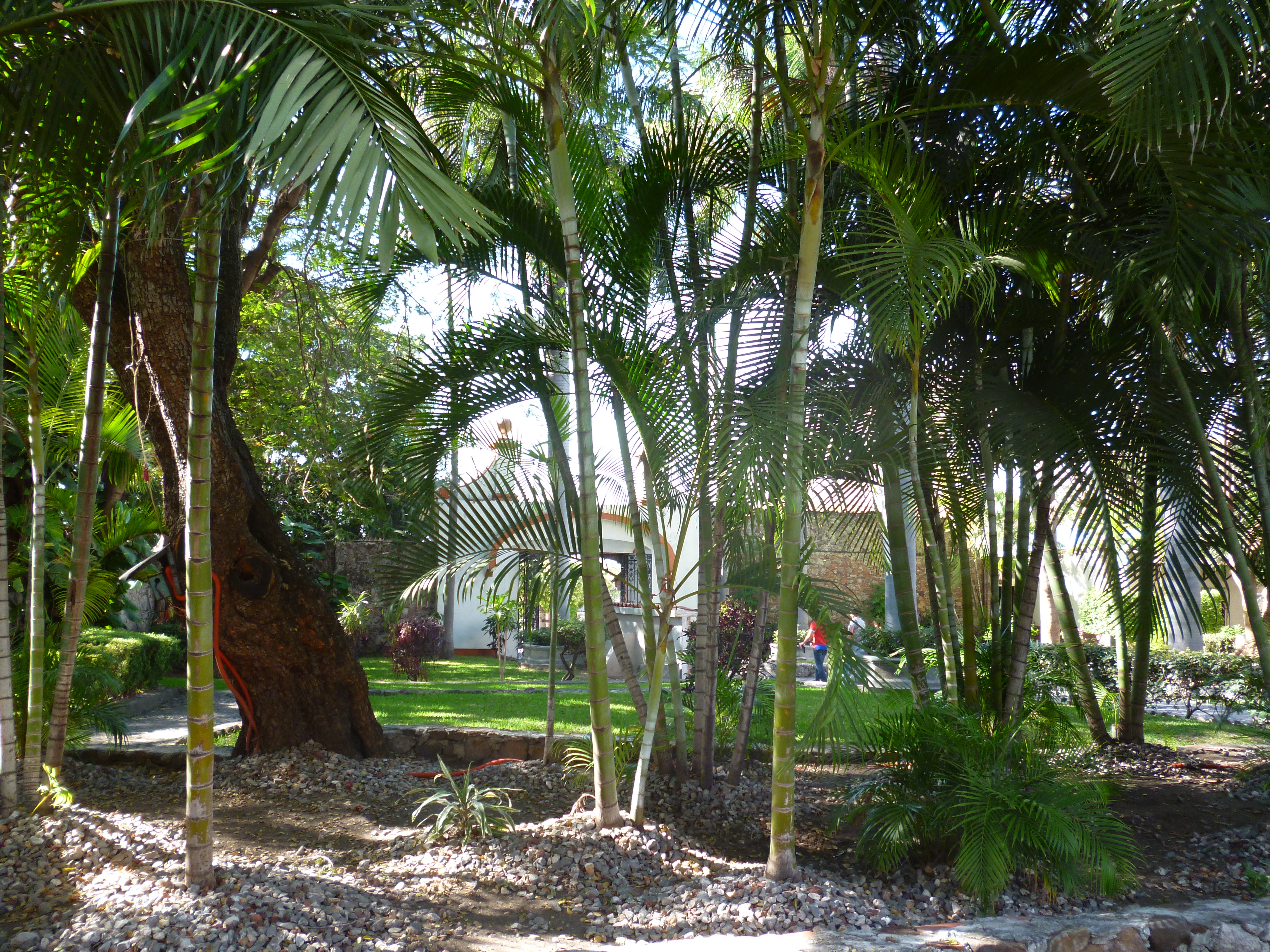 una de las principales áreas verdes con caminos en la Hacienda Vista Hermosa, Tequesquitengo, Morelos. México